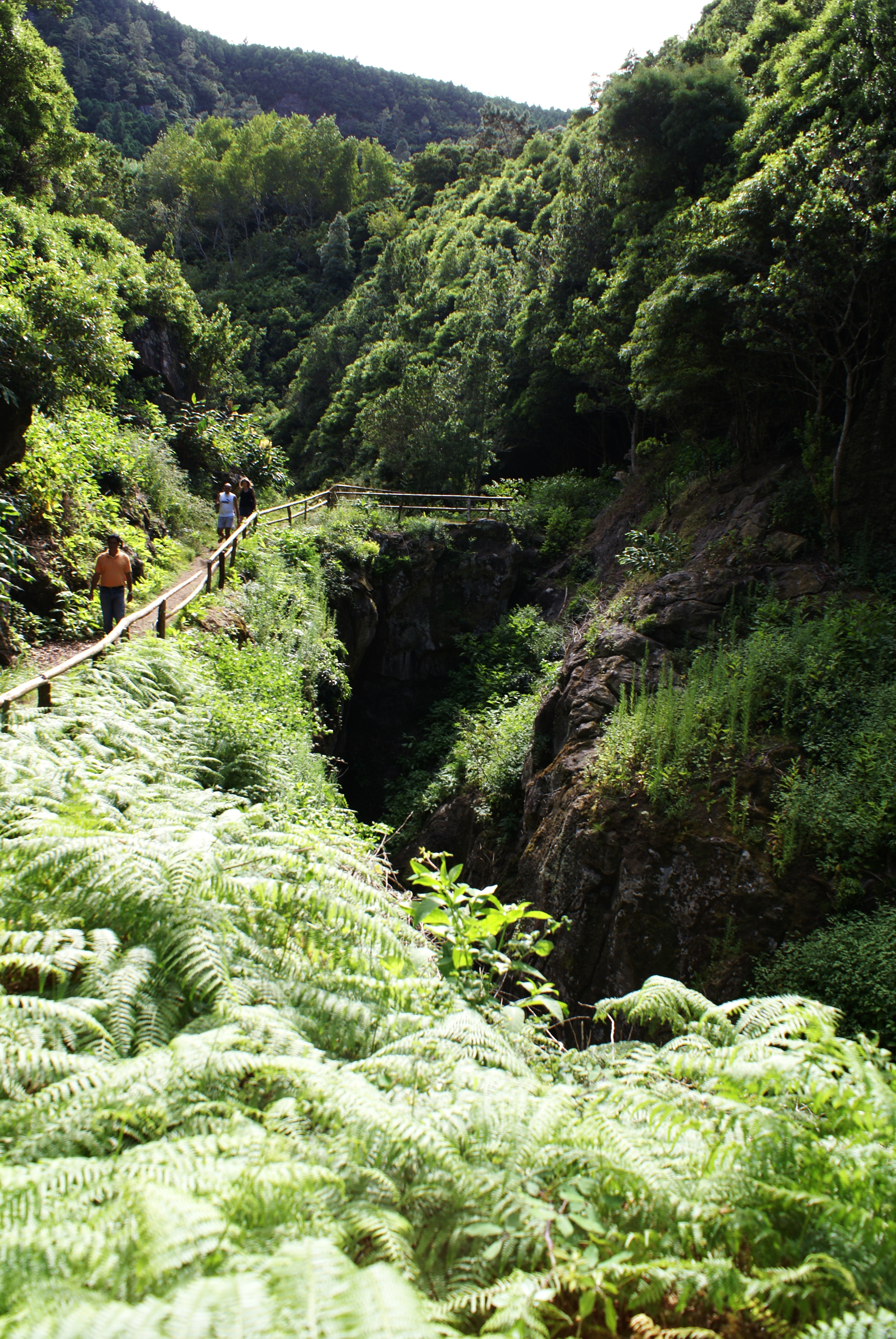 Furna do Enxofre, Caminho de acesso, Santa Cruz da Graciosa, ilha Graciosa, Açores, Portugal